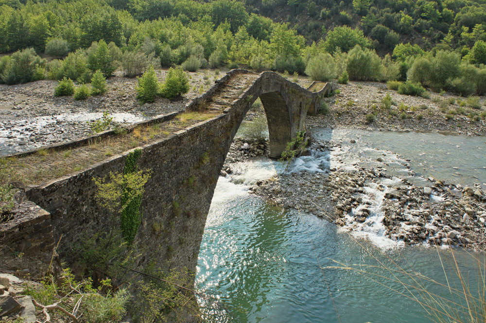 Γέφυρα Παπαστάθη, Ημερομηνία : 31-7-2016.